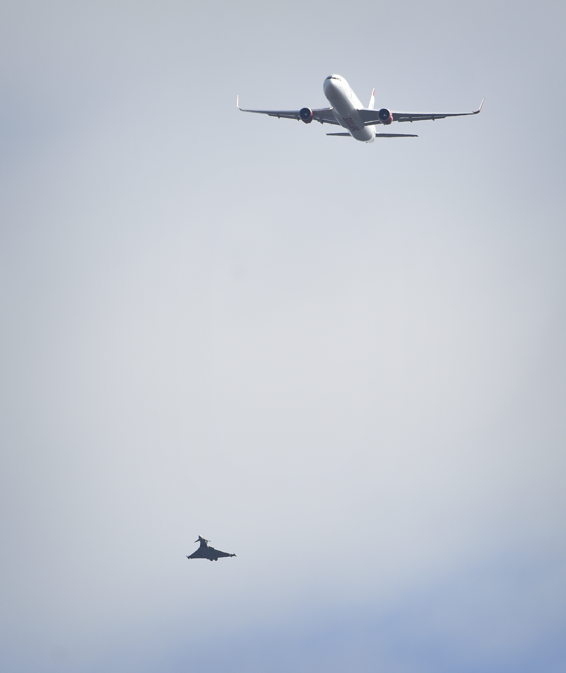 Ein Eurofighter der Alarm-Rotte und die Boeing 767 im Himmel über Zeltweg.